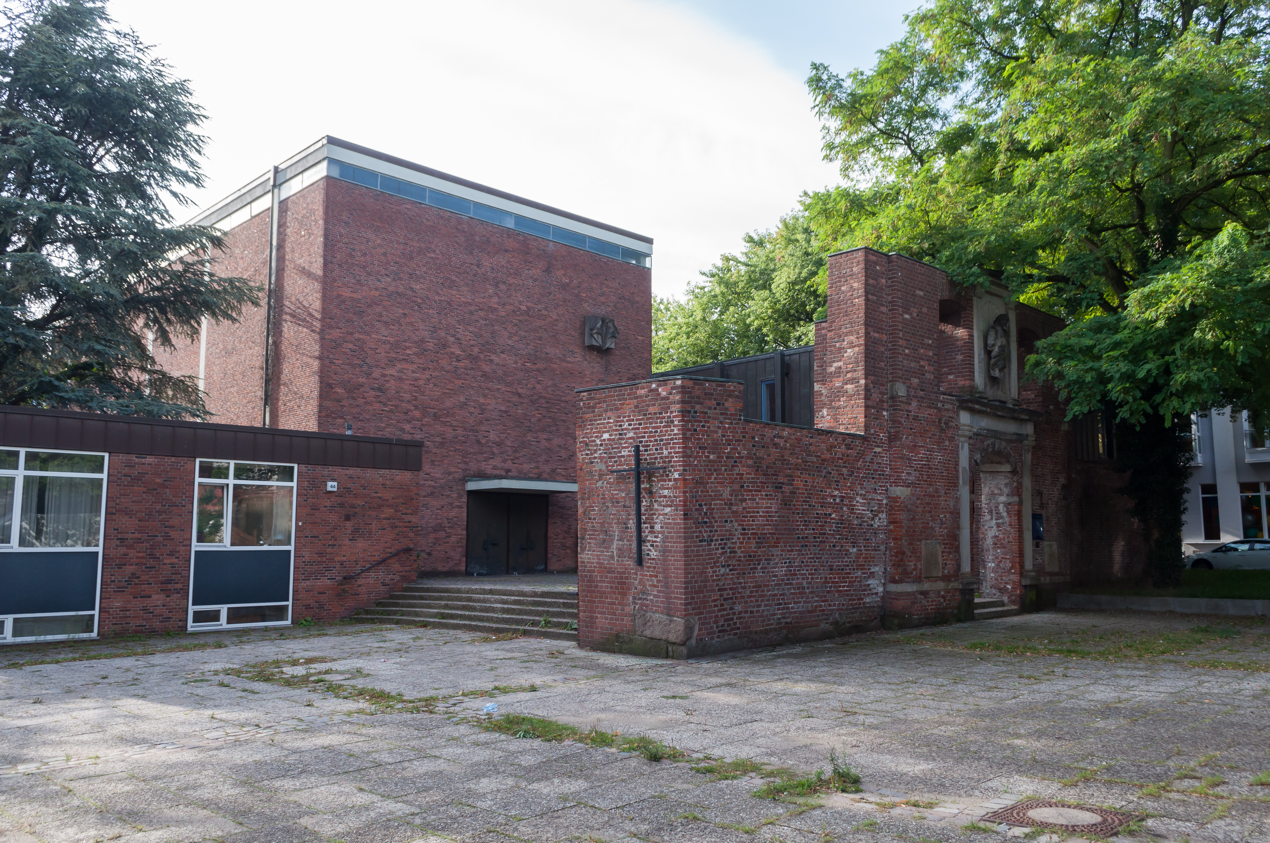 Dreifaltigkeitskirche in Hamburg-Harburg. This is a photograph of an architectural monument.